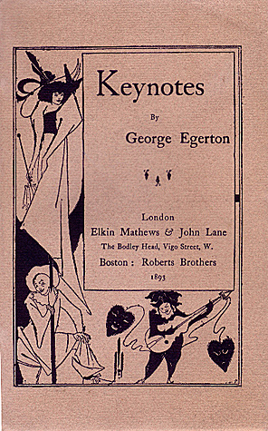 Umschlagcover des Romans Keynotes von George Egerton, Illustrationsentwurf von Aubrey Beardsley, 1893